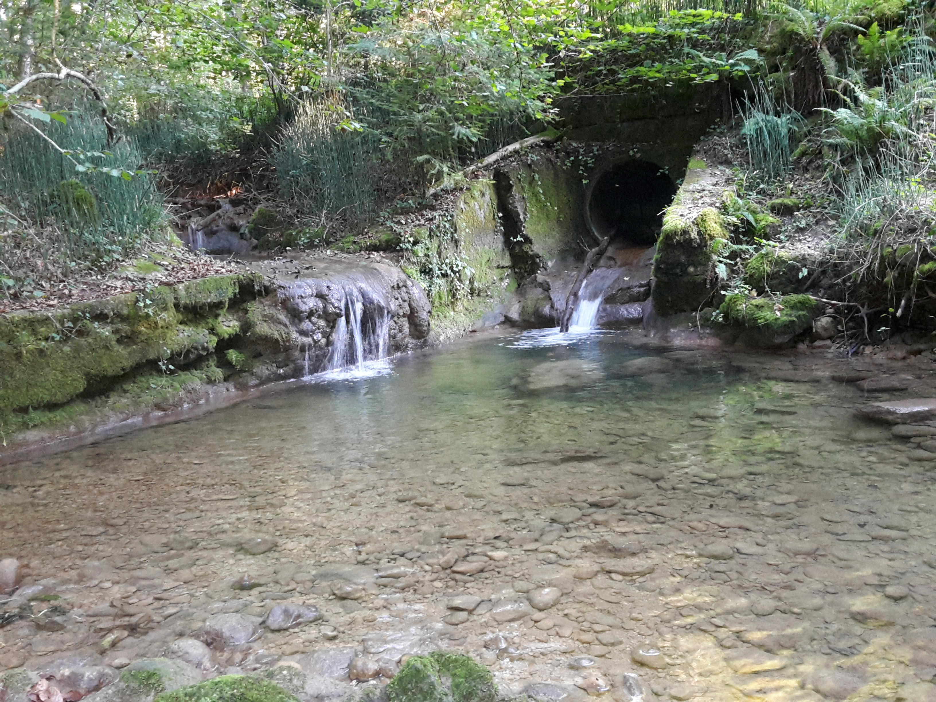 Einmündung des Dikibachs (links) in den Hüenerbach im Giessentobel, Illnau-Effretikon, Kanton Zürich